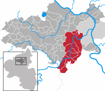 Karte selbst angefertigt ; GNU-FDL